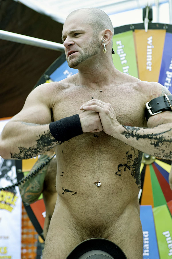 Tober Brandt